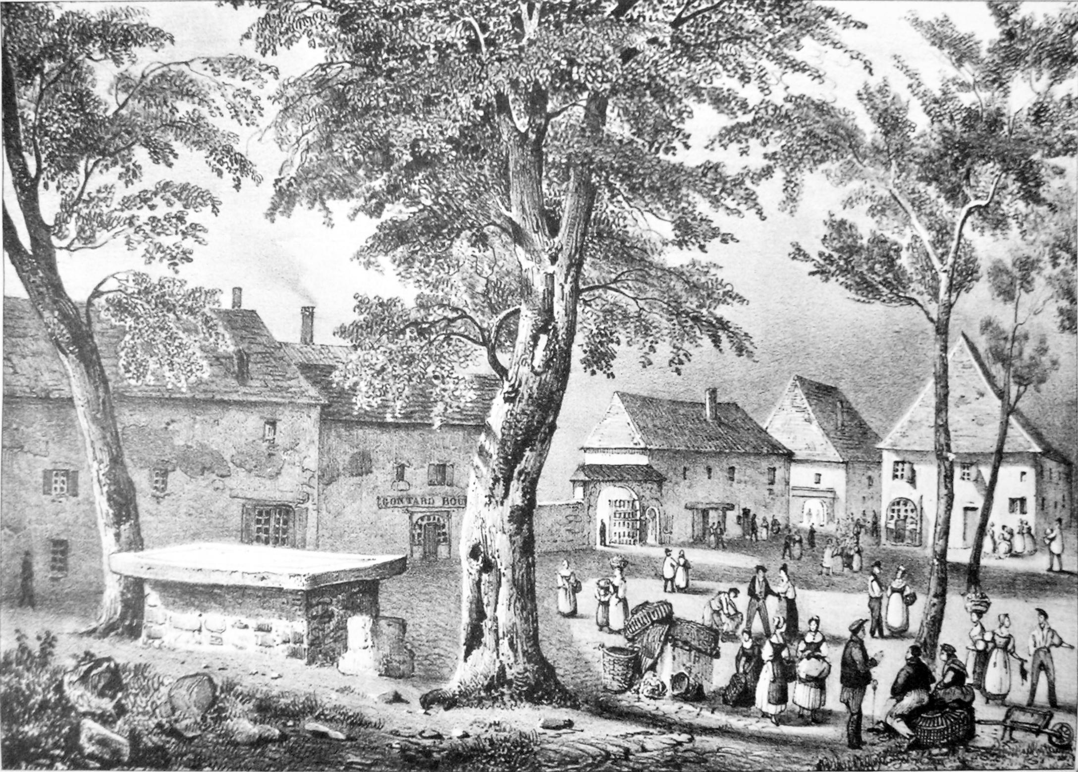 Aoste (Isère) ATTENTION ! Ce facsimilé est réalisé en applicant des alterations avec un logiciel graphique à une copie numérique, obtenue à partir d'une prise de photo faite par un non-professionnel. Elle pourrait ne pas être parfaitement réussie.